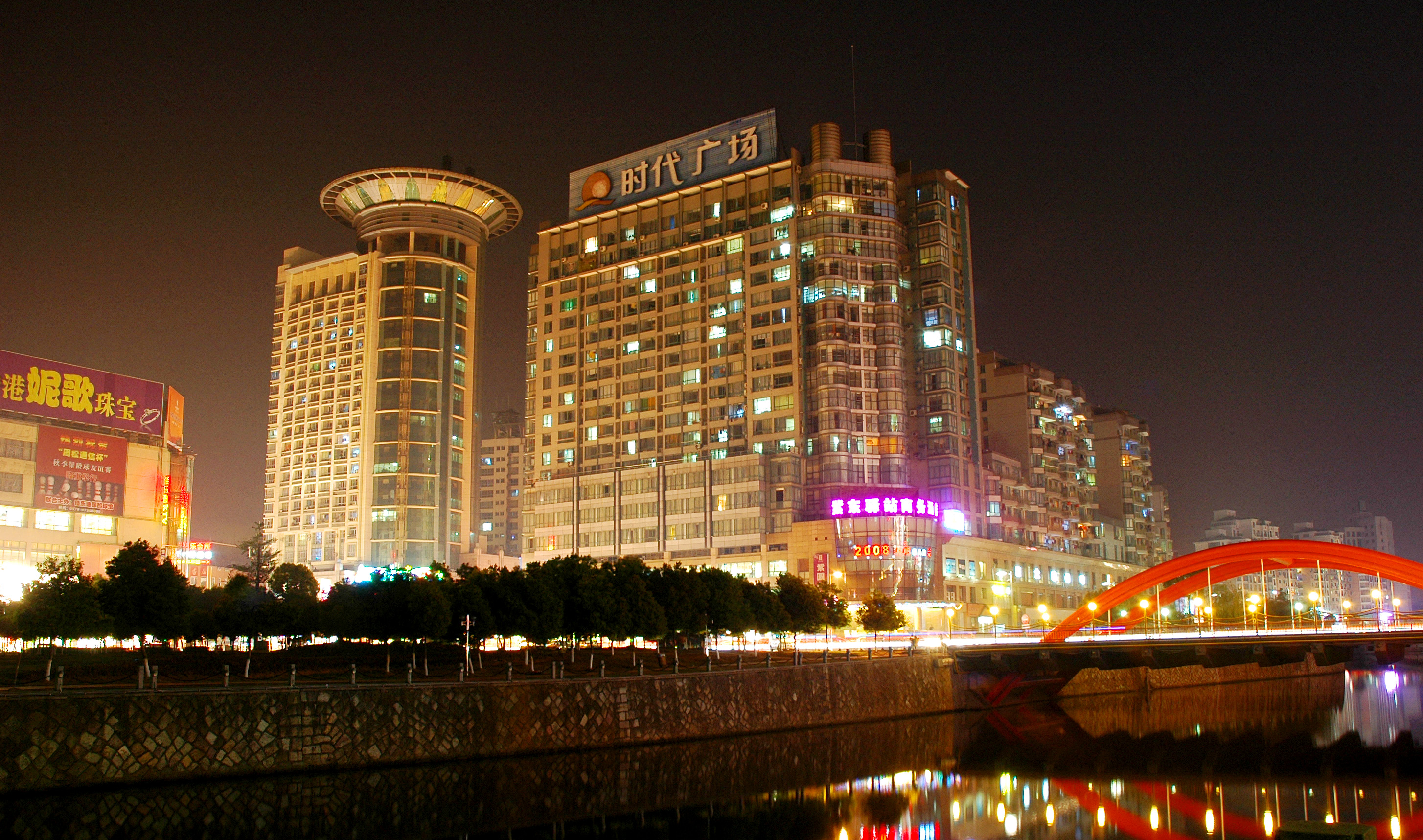 永康夜景